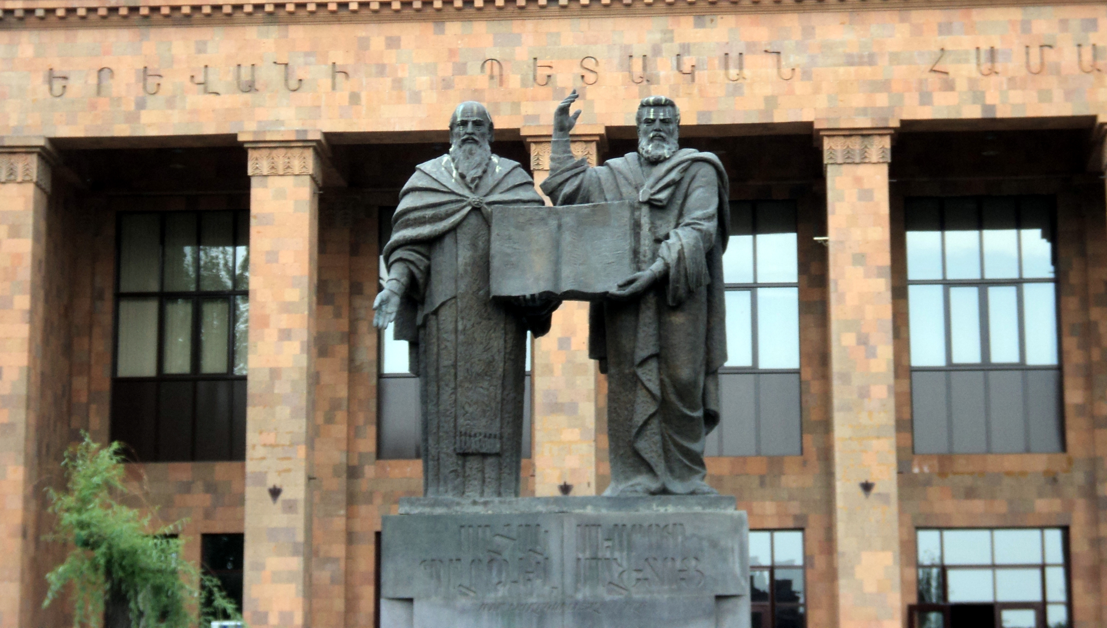 Մեսրոպ Մաշտոց և Սահակ Պարթև- բազալտ, հեղինակ` Արա Սարգսյան, ճարտարապետն Է. Ռ. Ջույհակյանը։ Ստեղծվել է 1943 թվականին, տեղադրվել է 2002 թվականին Երևանի պետական համալսարանի գլխավոր մասնաշենքի դիմաց։ 6/90.5